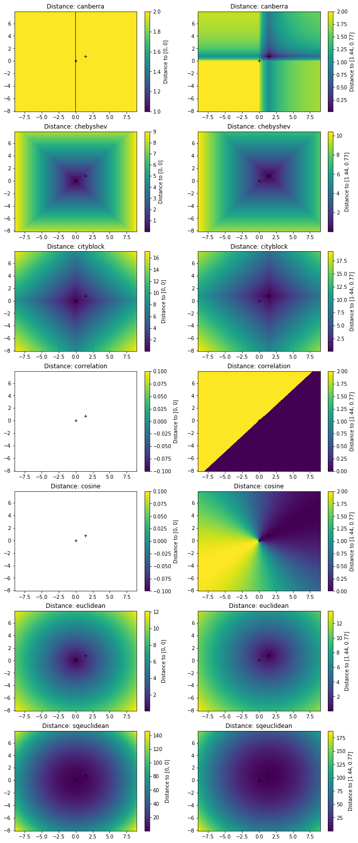 Visualisation des distances et semi-distances disponible dans le package Scipy (Python). Pour (re)générer la figure